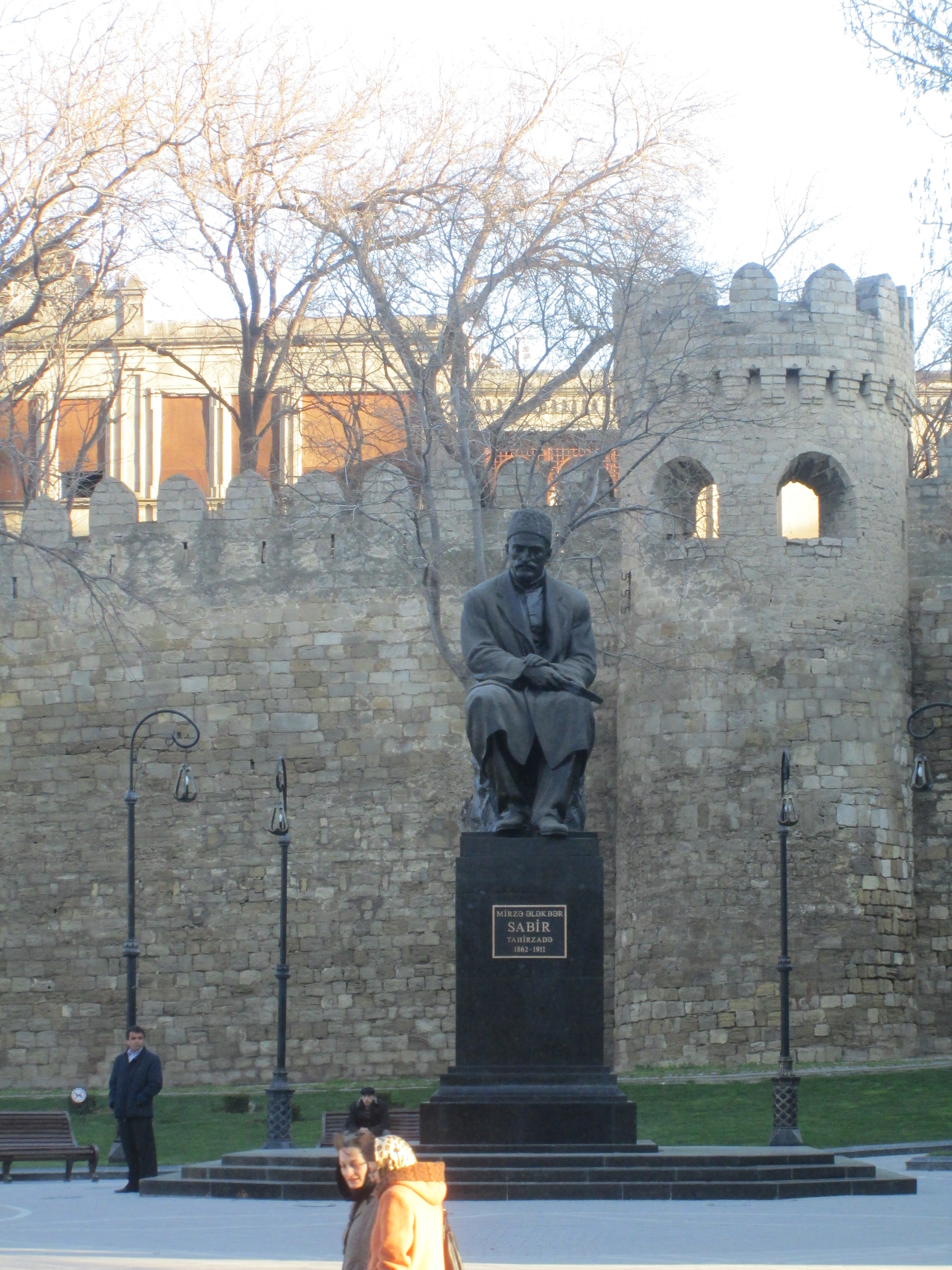 Mirzə Ələkbər Sabirin heykəli